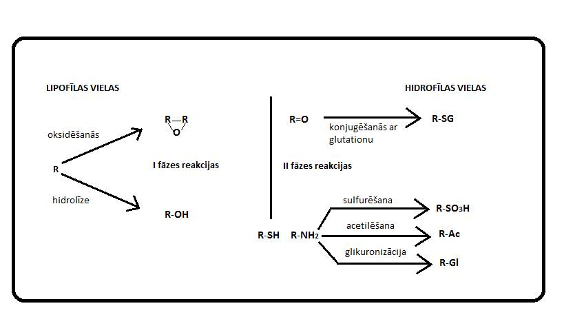 metabolisma reakciju apkopojums